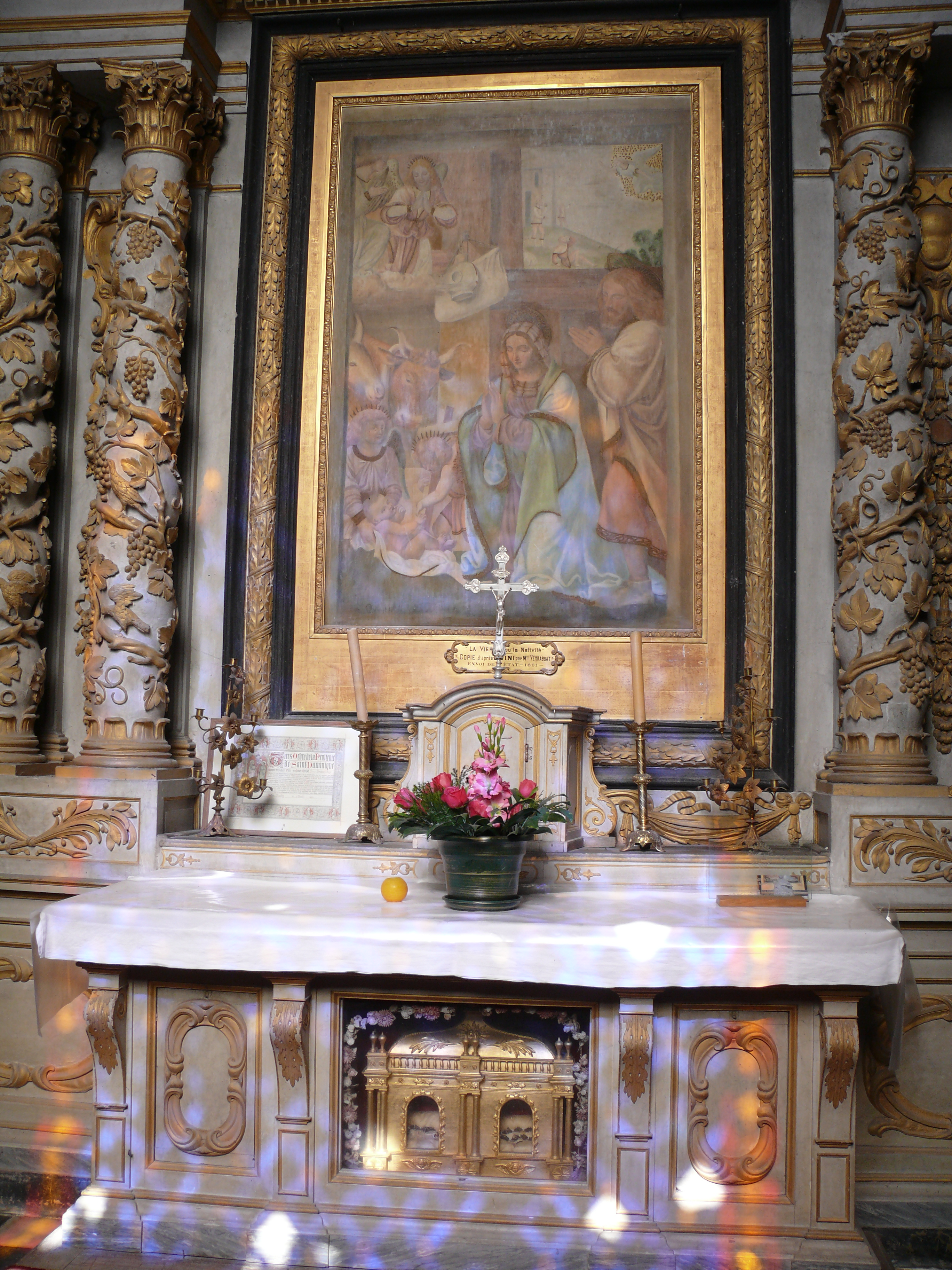 Chapelle de l'Assomption dans l'Église Saint-Martin (Pont-sur-Seine) : La Nativité, copie de Luini Retable à colonnes torses et pampres